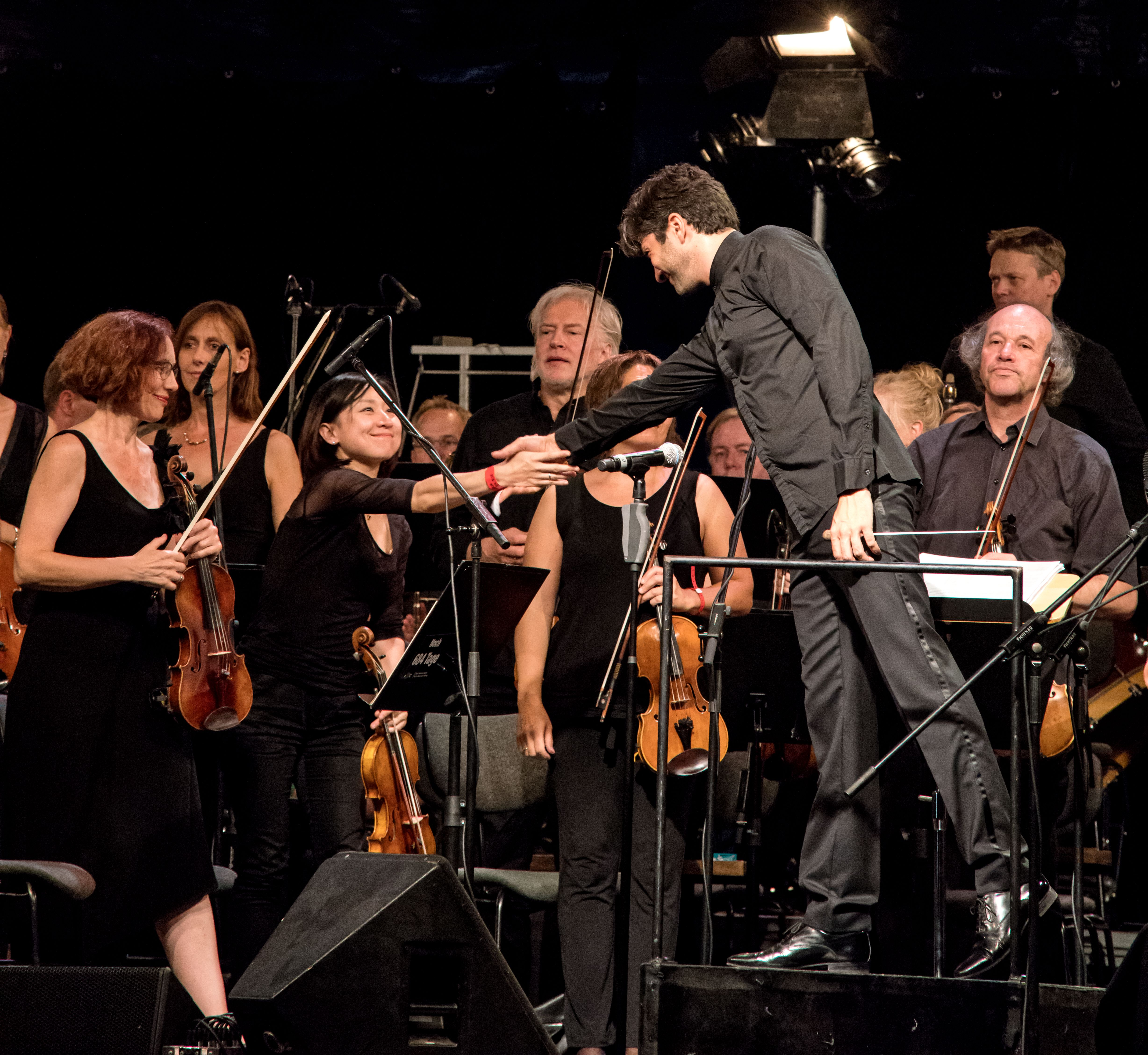 Bilder vom Zelt Musik Festival 2016 in Freiburg im Breisgau Die Gala